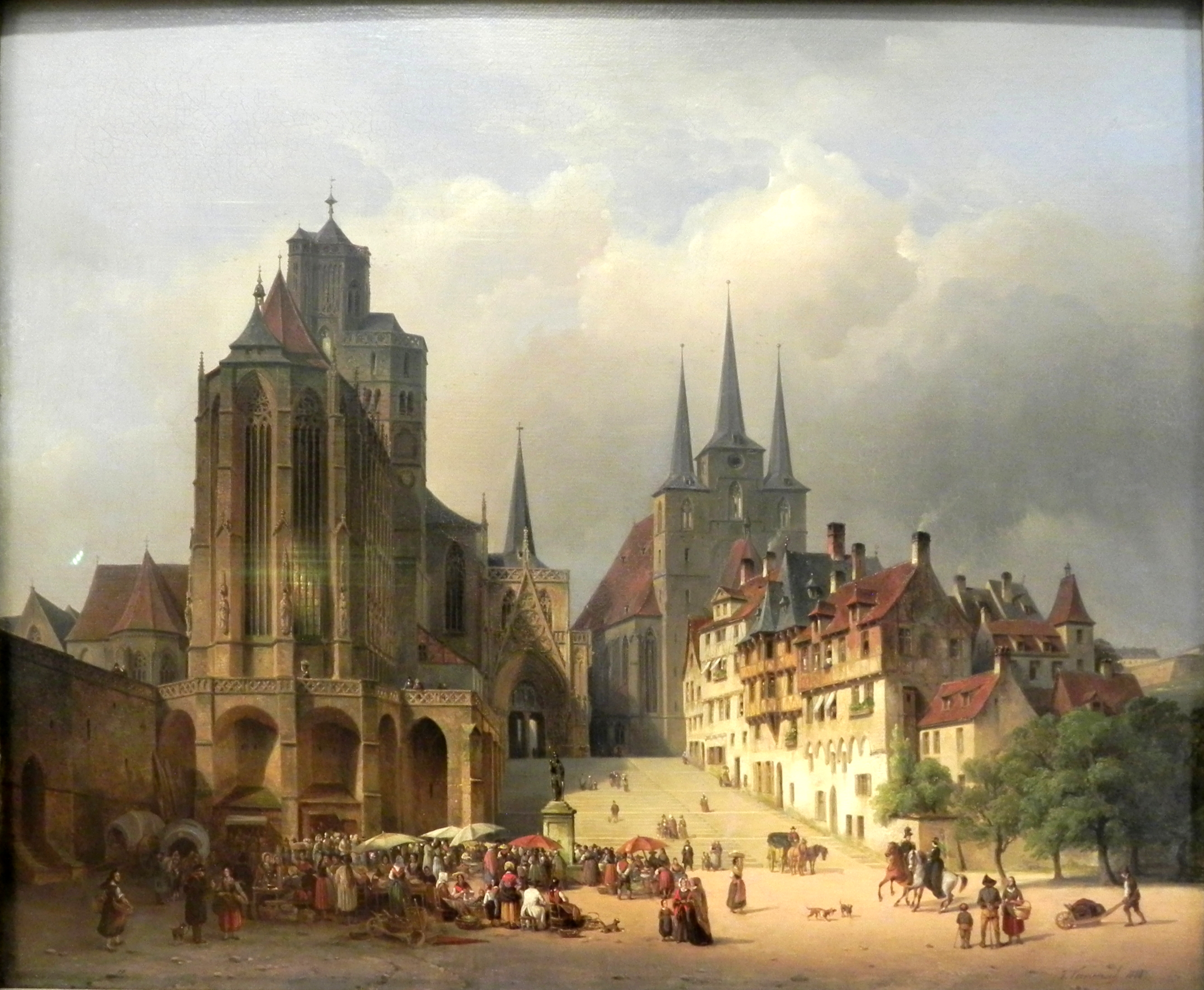 Am Dom zu Erfurt